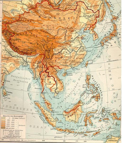 Mapa antiguo del lejano oriente